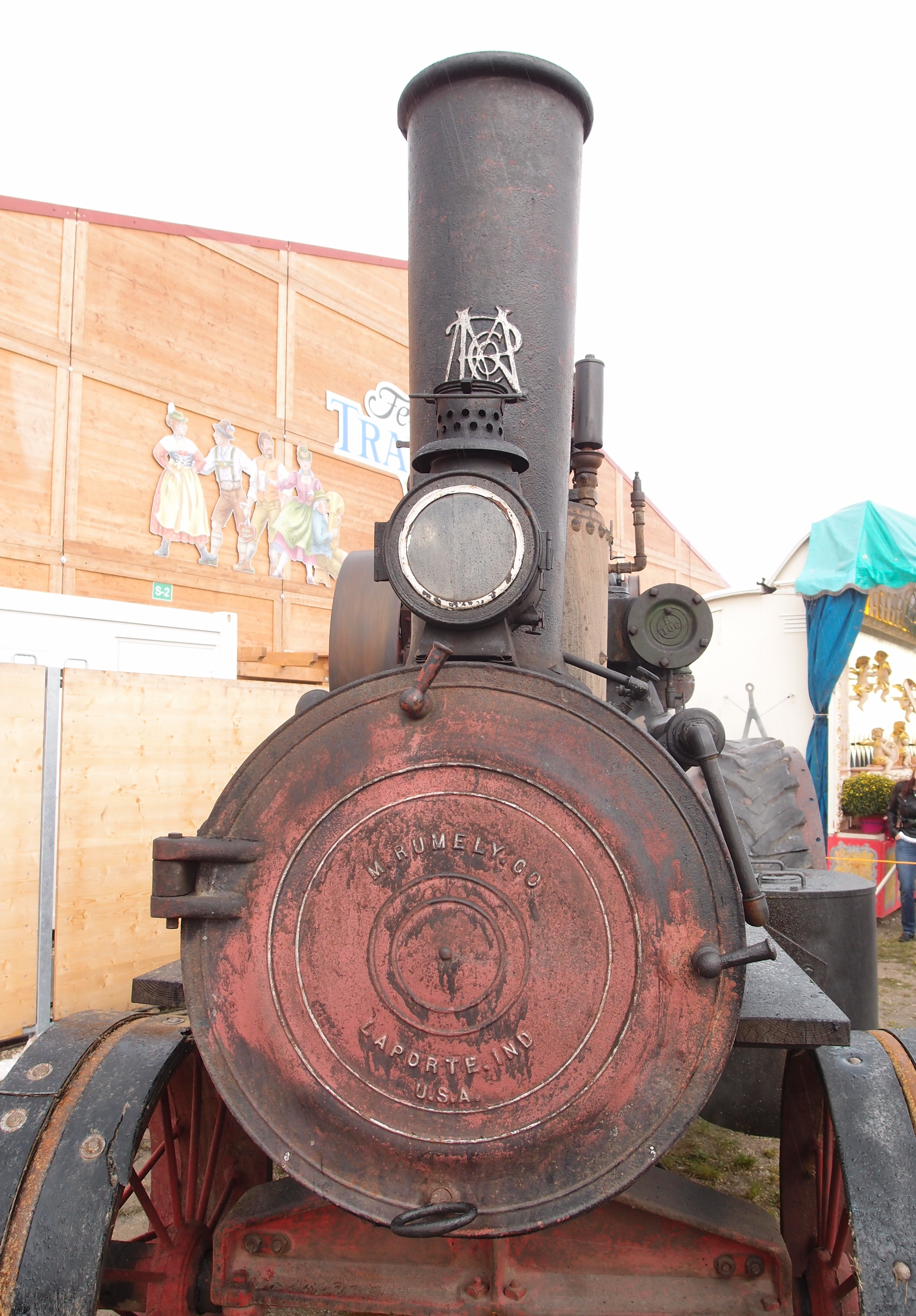 Rumely-Traktor auf der Oide Wiesn, Oktoberfest München 2014